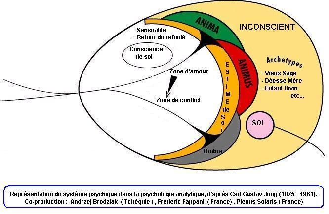 Graphique de modélisation de la théorie jungienne, dites psychologie analtique